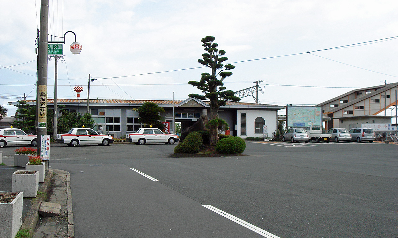 日豊本線築城駅